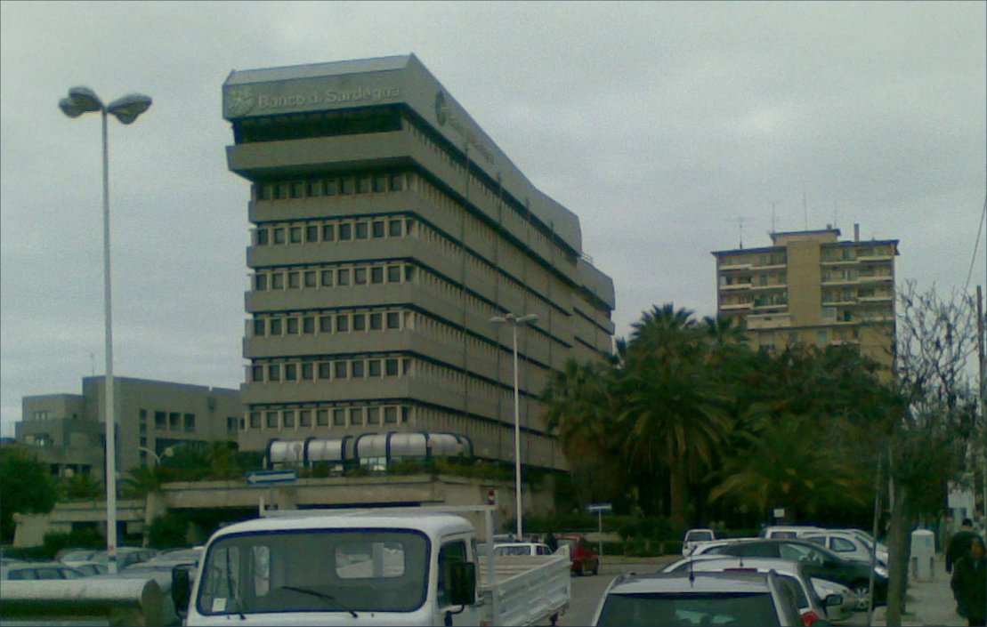 Sede principale del Banco di Sardegna a Cagliari